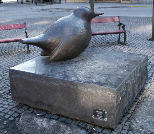 Vinterfågel by Göran Lange at Katarina Bangata, Stockholm, Sweden.